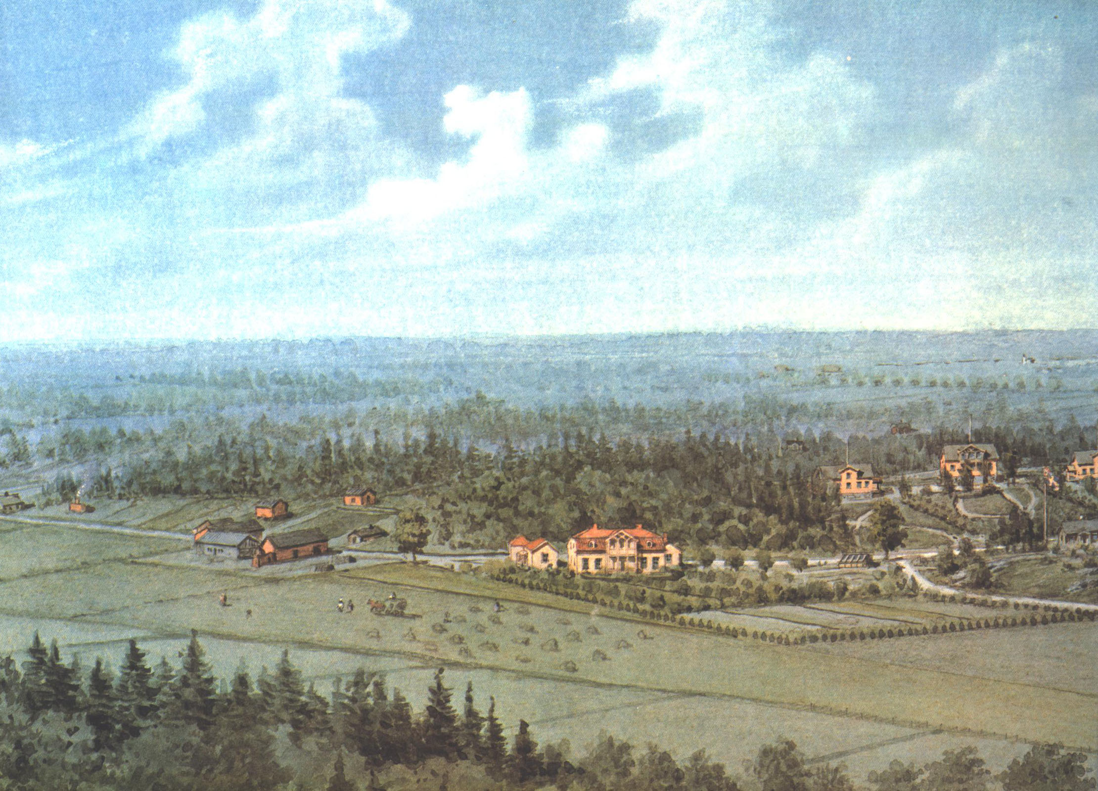 Gångsätra gård med herrgården uppförd 1868 mitt i bild som det avbildats på en målning av Otto August Mankell (1838-1885), 1883 efter en ballongfärd över området vid Gångsätra. cropped